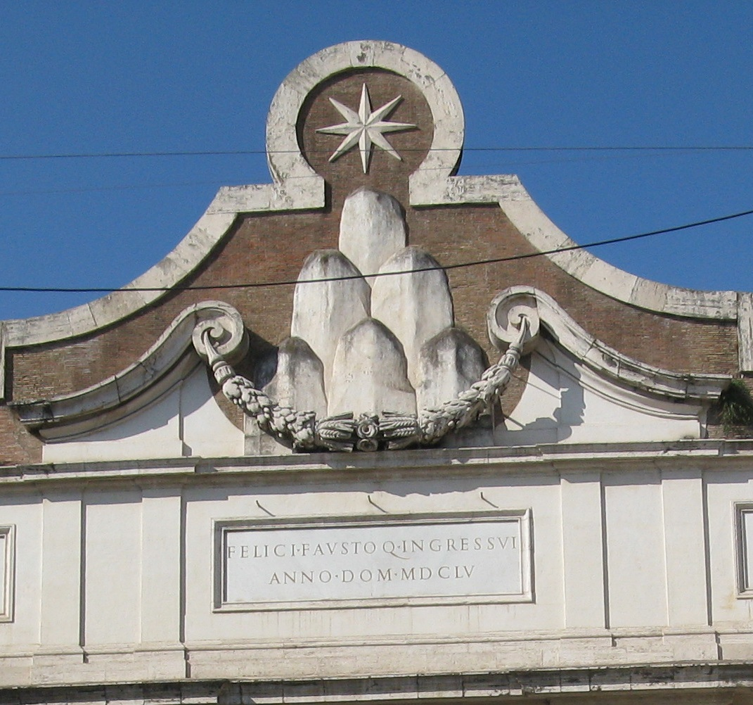 Porta del Popolo: iscrizione commemorativa dell'ingresso a Roma di Cristina di Svezia